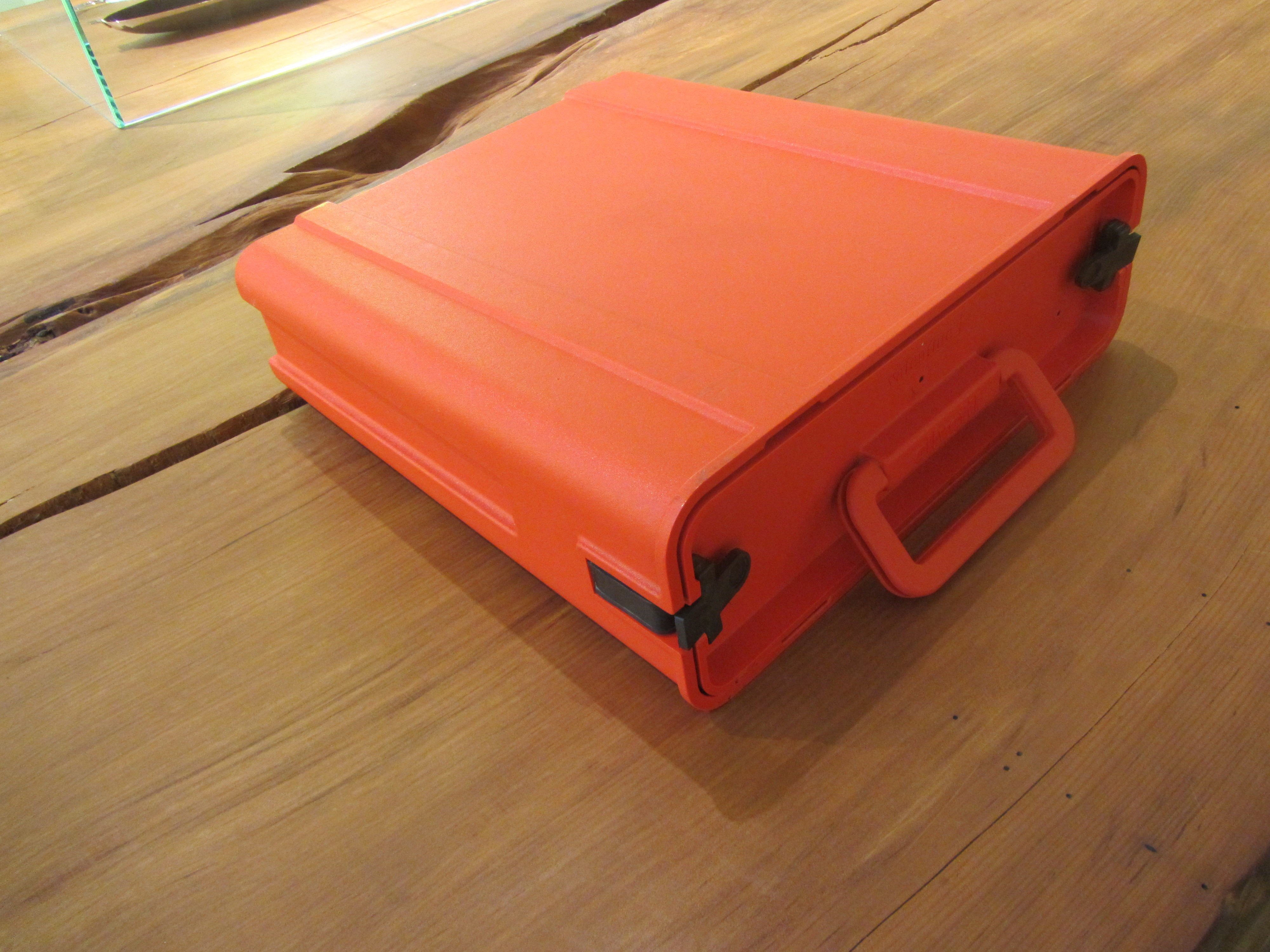 Una Olivetti Valentine chiusa dentro la sua scatola da trasporto conservata al Triennale Design Museum di Milano prodotta dalla olivetti nel 1968 e progettata da Ettore Sottsass